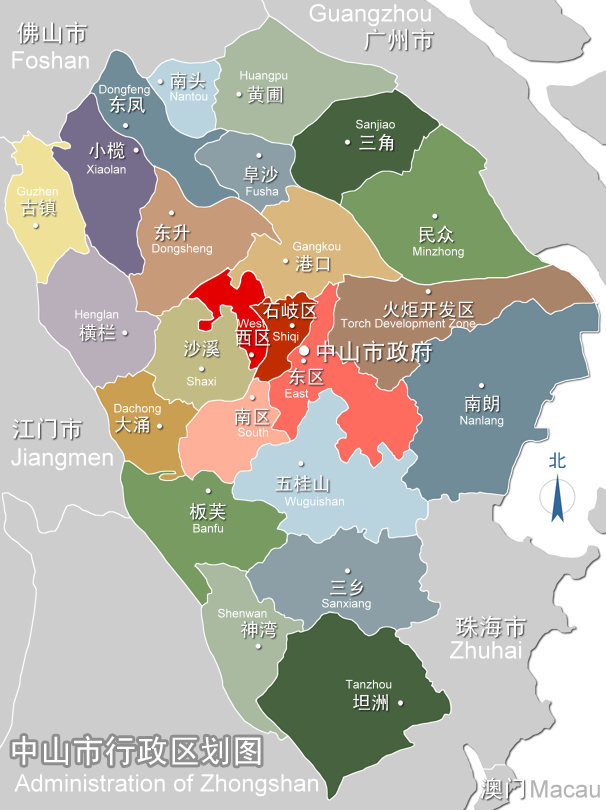 中山市行政区划图